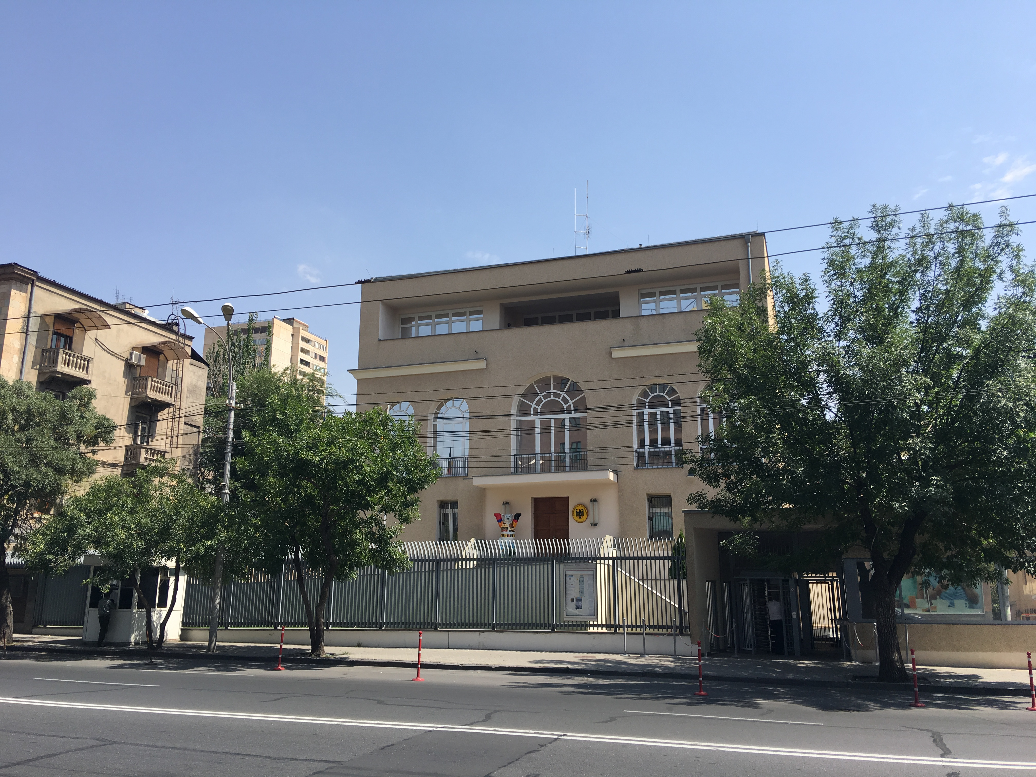 Հայաստանում Գերմանիայի դեսպանատուն